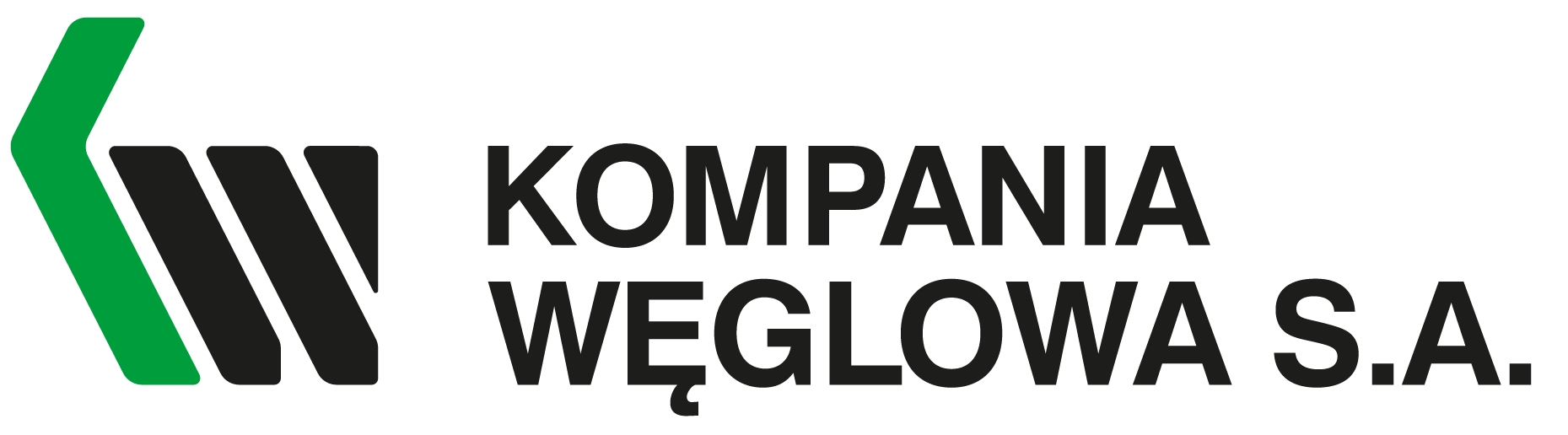 Logo Kompania WęglowaSA